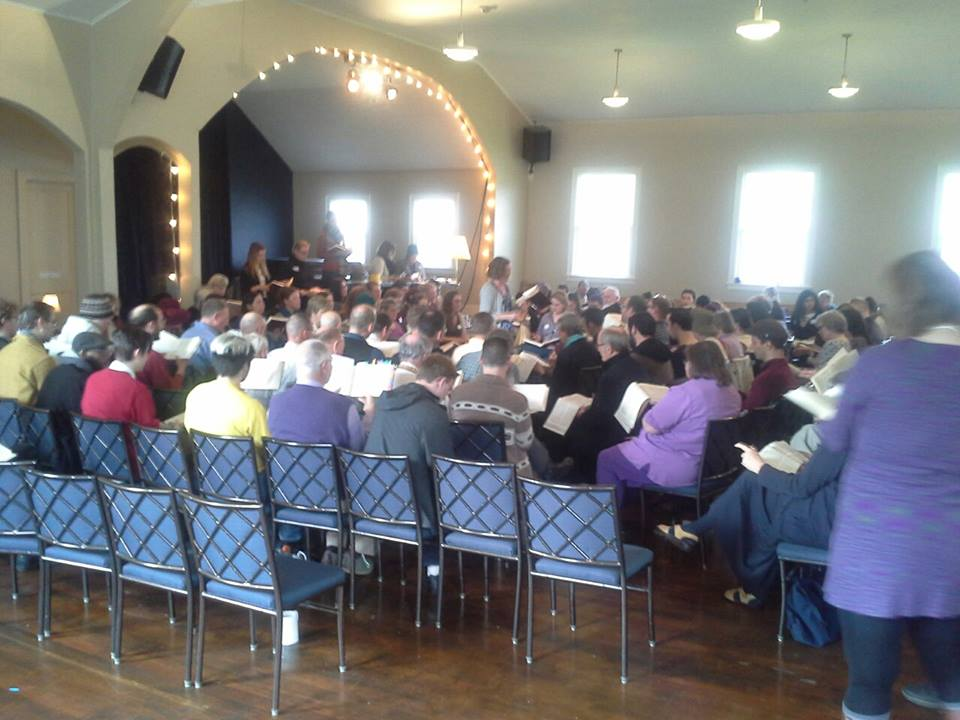 Kantantoj en la kava kvadrato ĉe kantokunveno de Sacred Harp en Seatlo, 2016-02-21